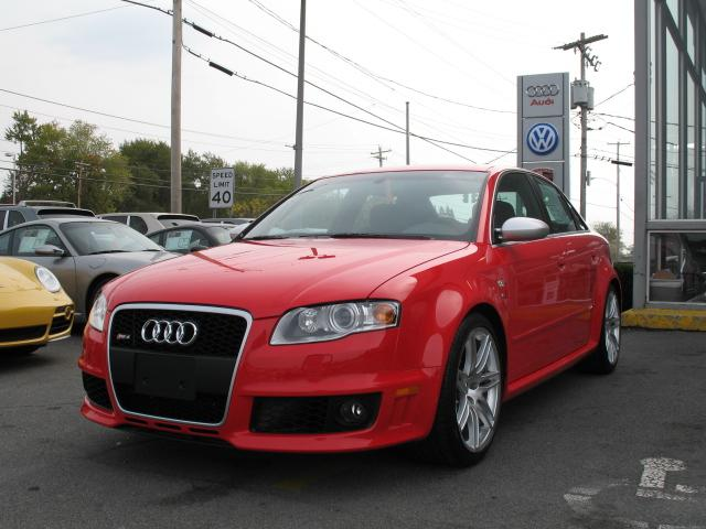 Audi RS4